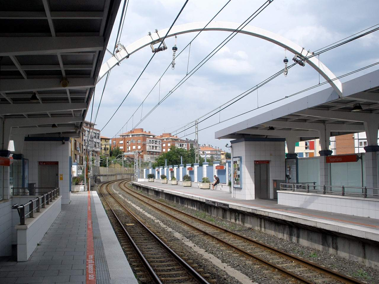 Paisaje urbano de Sopelana, población anodina, pero tranquila y de agradable vivir, en Bizkaia